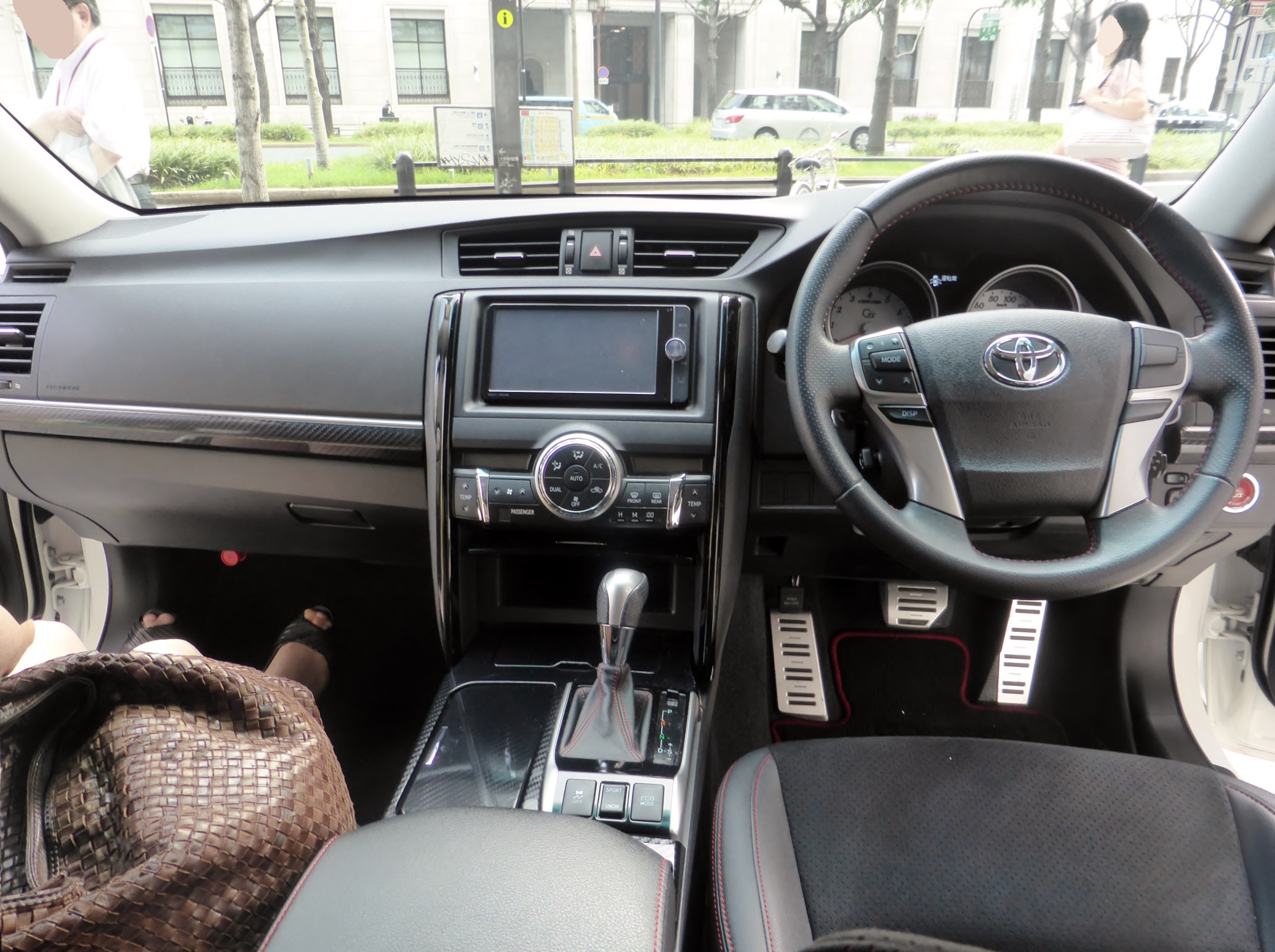 X130型トヨタ・マークX G'sのインテリアを撮影。